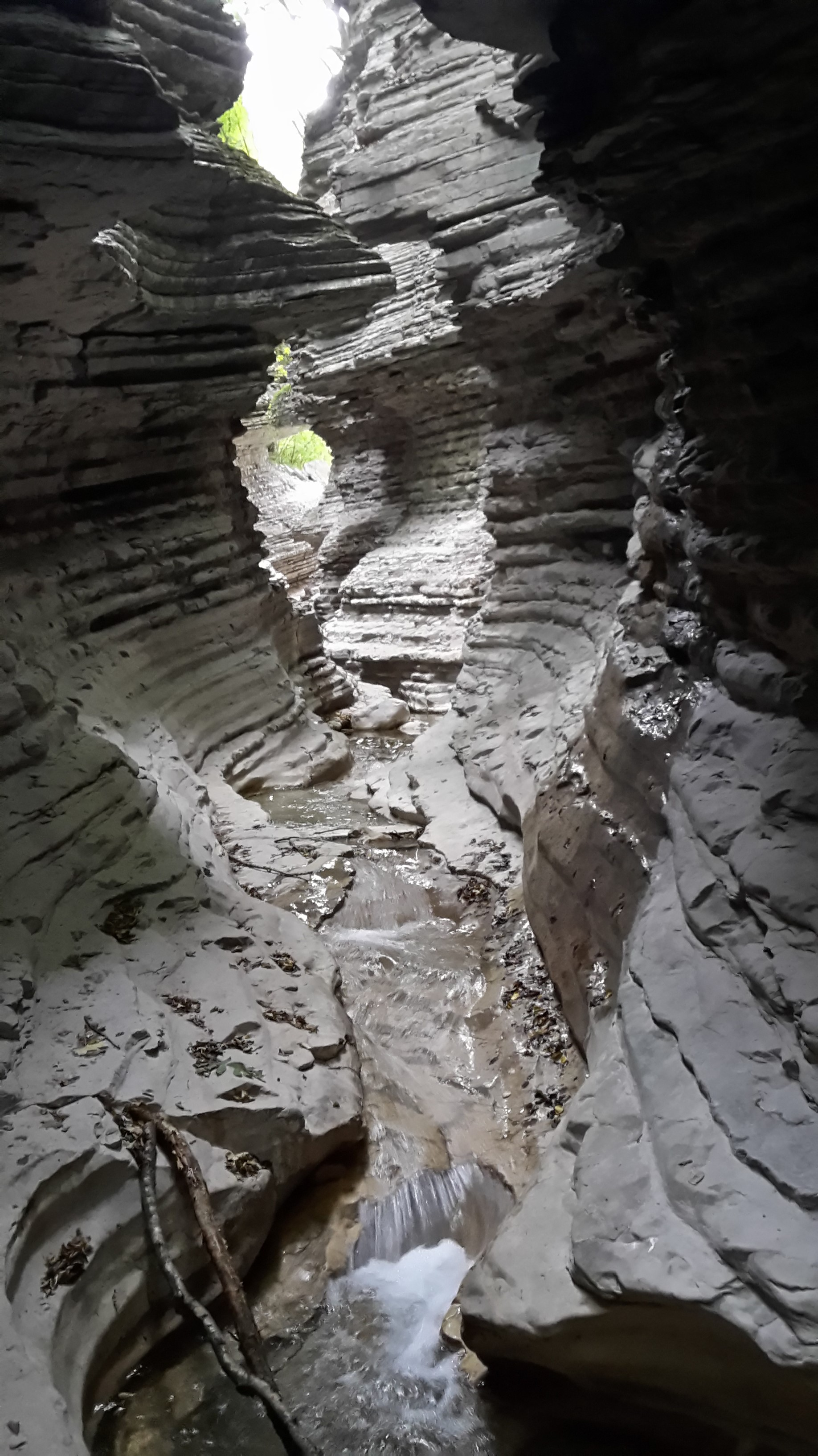 Gola nota con il nome di Brent dell'Art, formata dal torrente Ardo nei pressi della località Sant'Antonio Tortal.